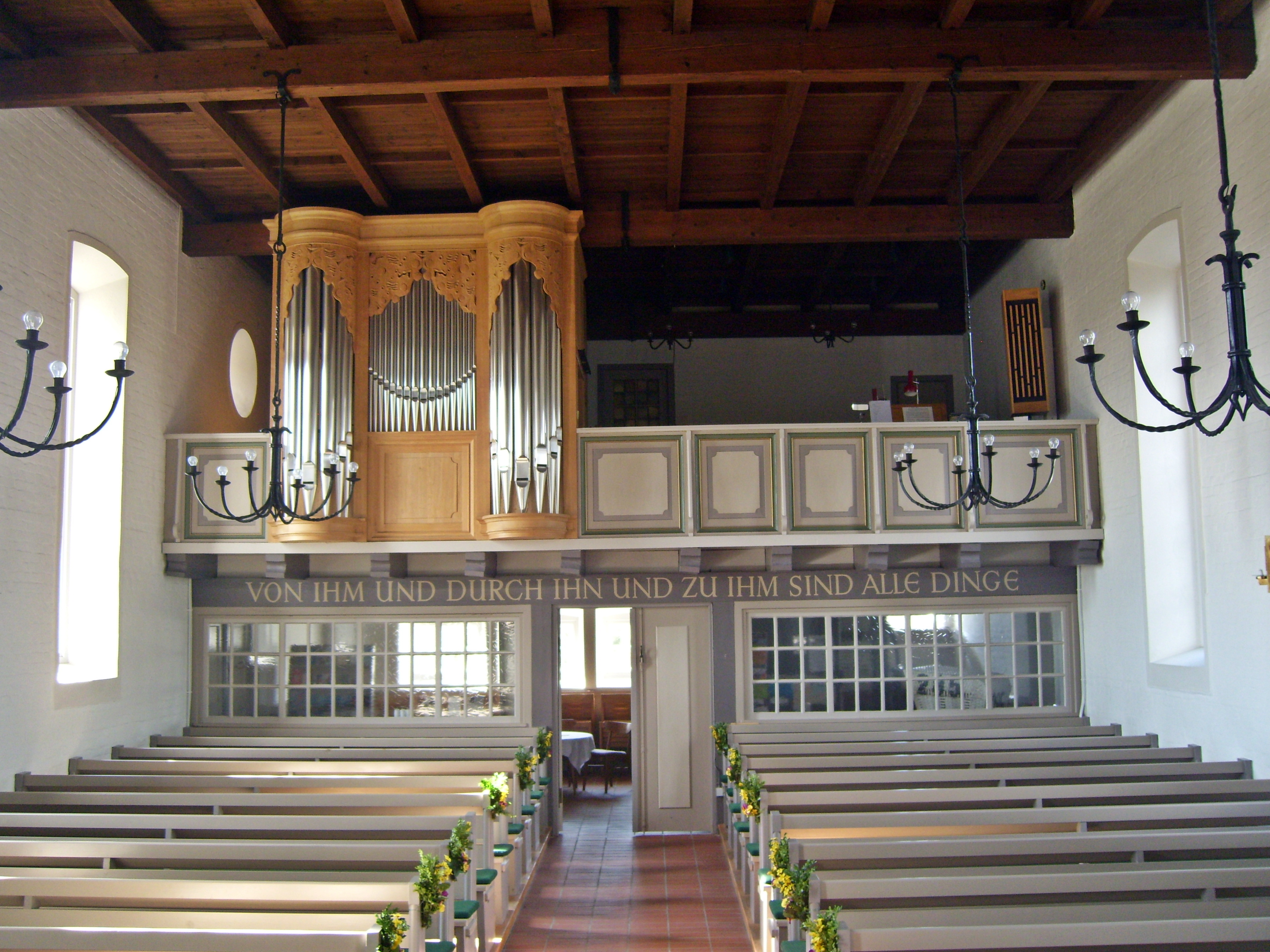 Denkmalgeschützte Kirche St. Jürgen List Blick durch die Kirche auf die Orgelempore